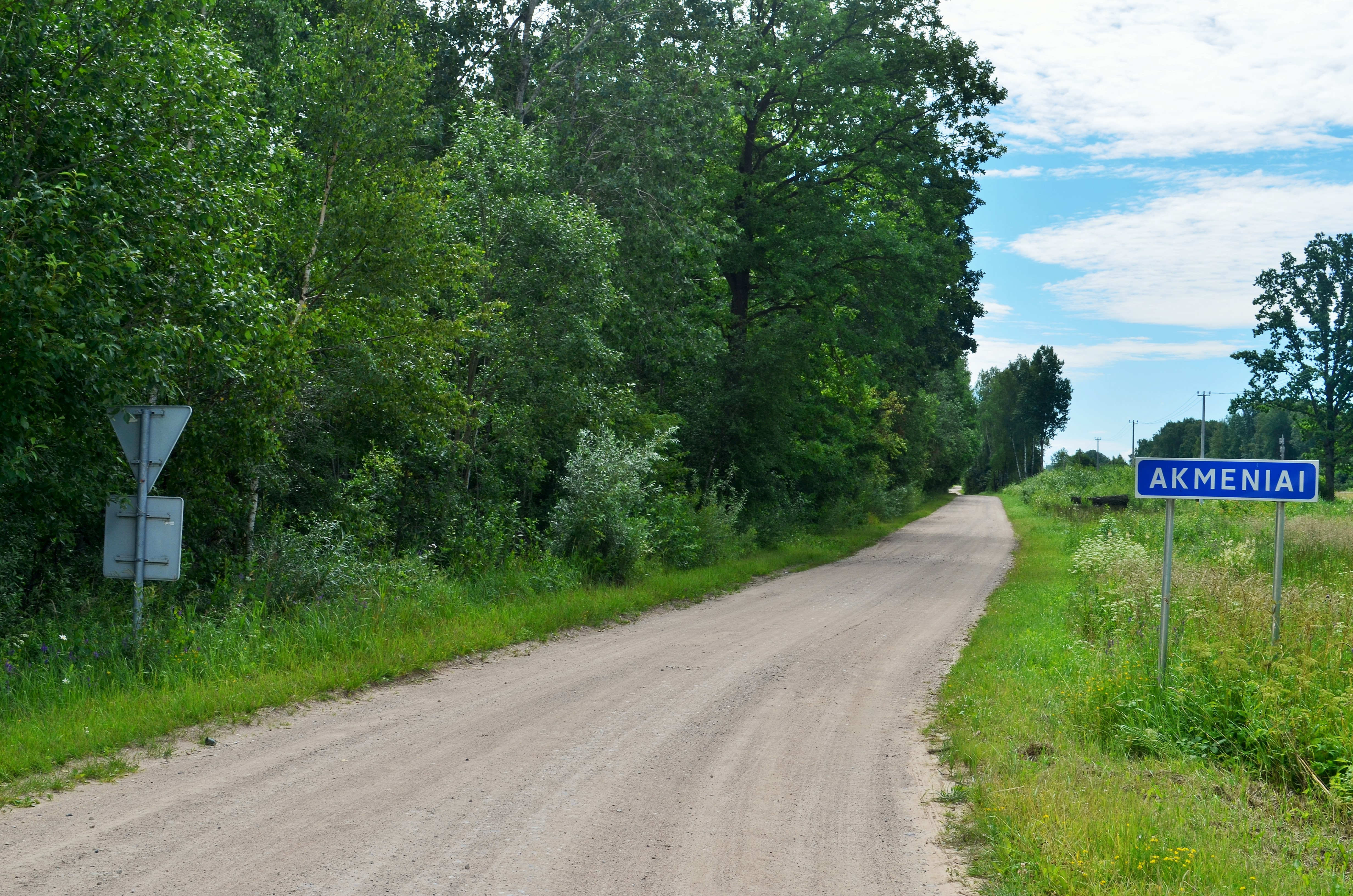 Akmeniai, Kėdainių raj.